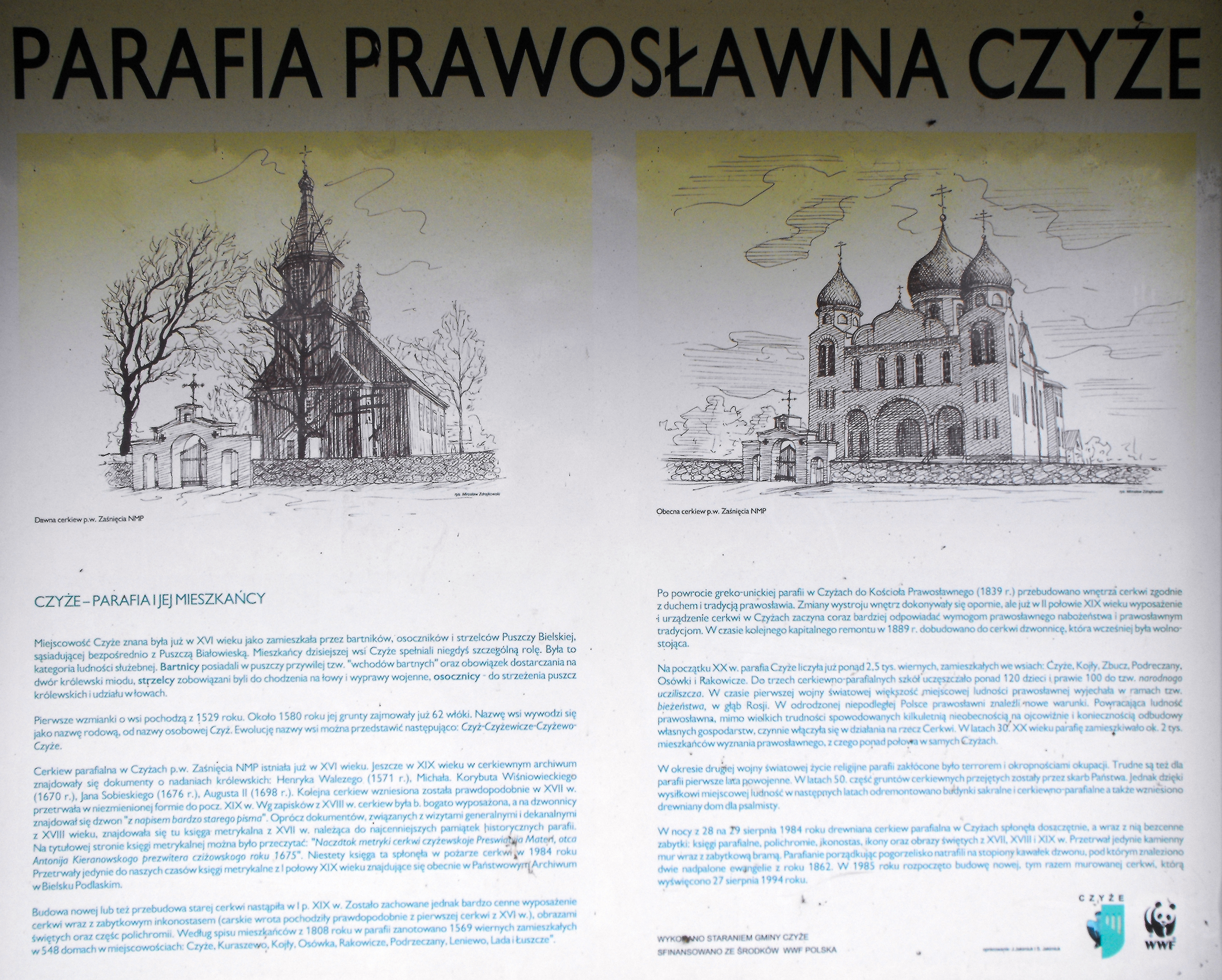 Tablica informacyjna przy Cerkwi Zaśnięcia NMP w Czyżach.